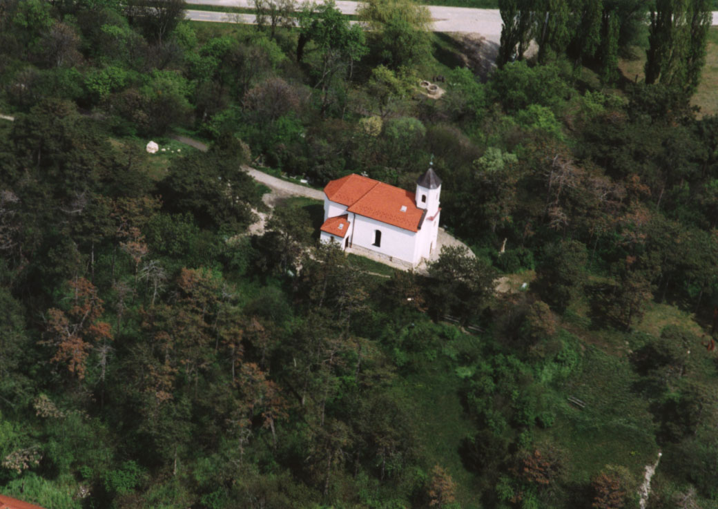 Szent Mihály-domb - Vonyarcvashegy - Hungary.